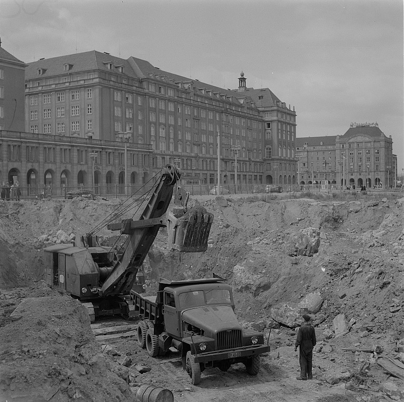 Original image description from the Deutsche FotothekTiefbauarbeiten für die Bebauung der Ernst-Thälmann-Straße (Nordseite), Beladen eines Muldenkippers G 5 mit Hochlöffelbaggeer auf Raupenfahrwerk